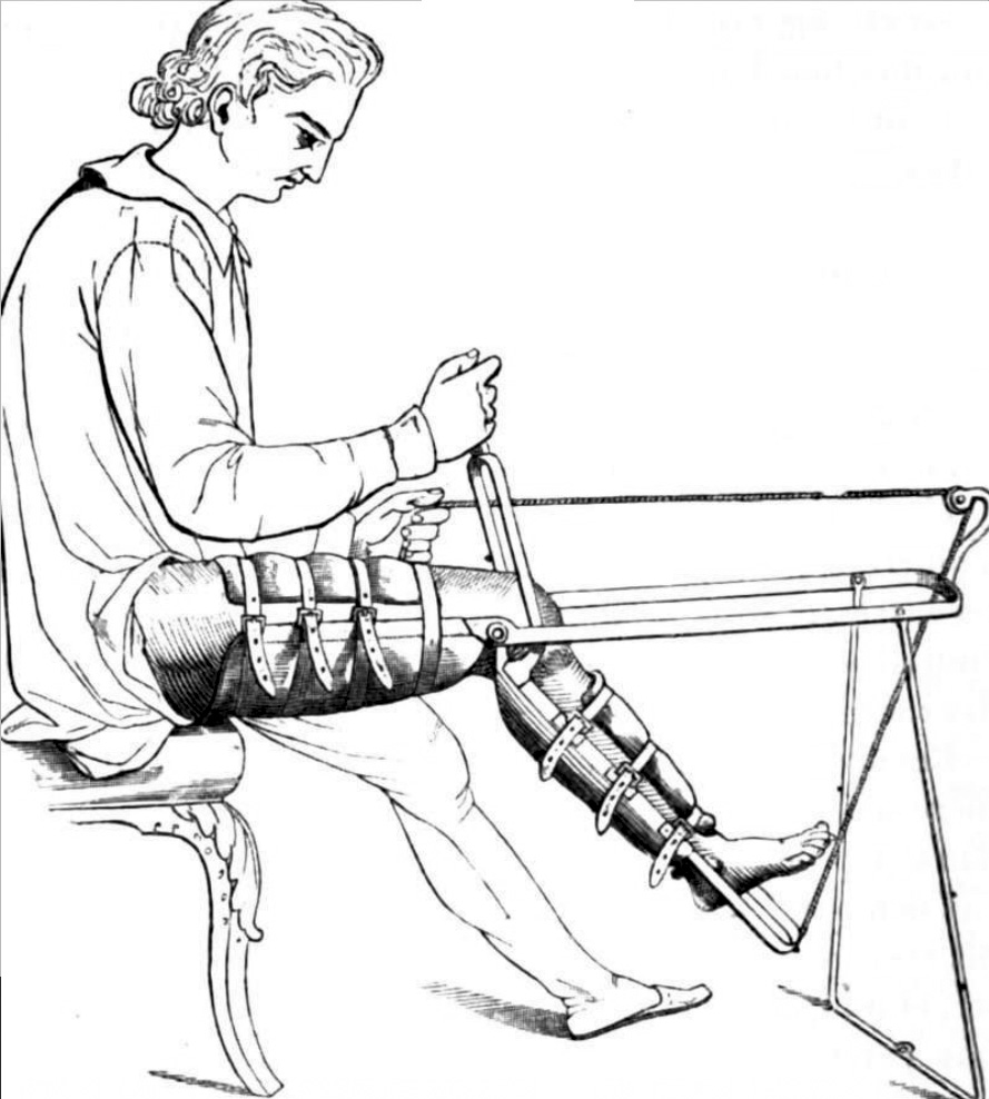 Darstellung eines ??? im Buch Traité de thérapeutique des maladies articulaires von Amédée Bonnet.